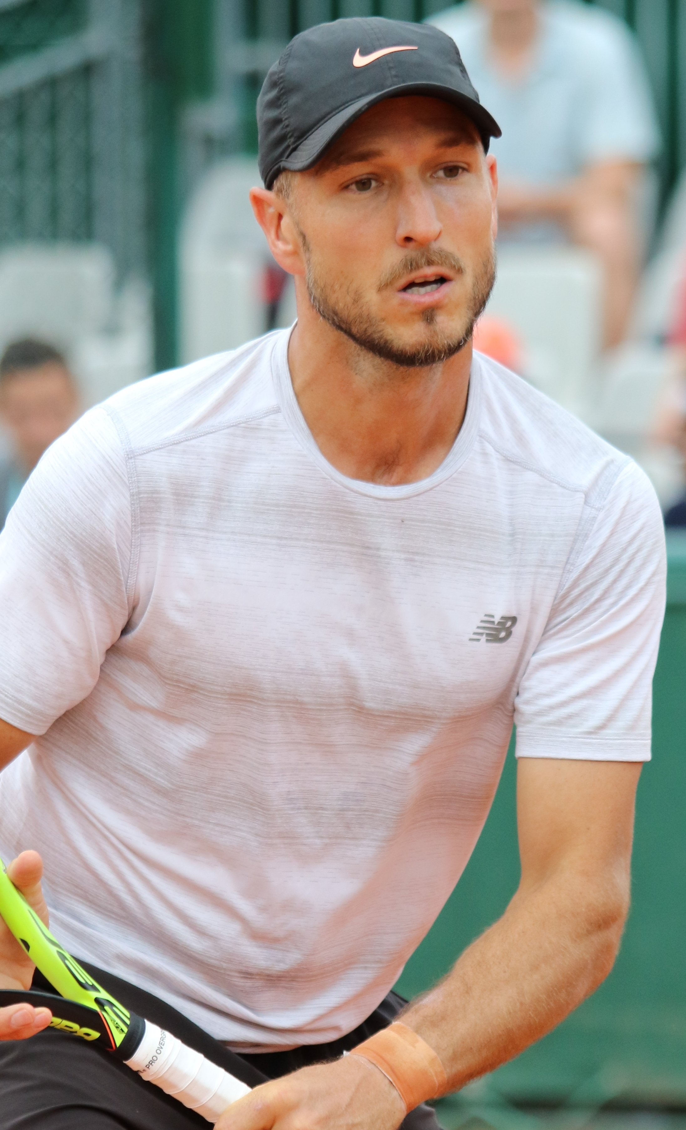 Cerretani RG18 (9)